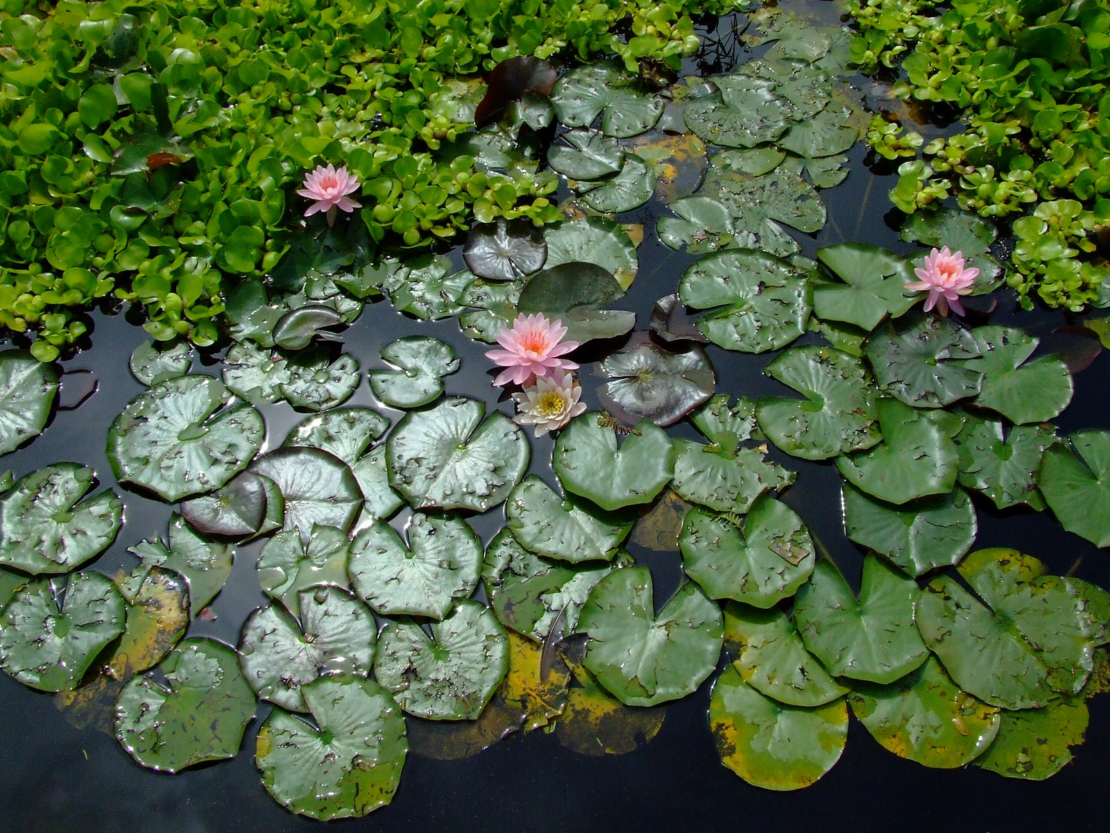 ninfee nel Parco Sigurtà